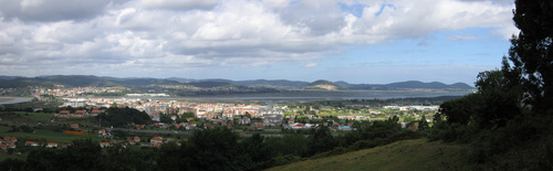 Panoramica de Colindres en la actualidad.